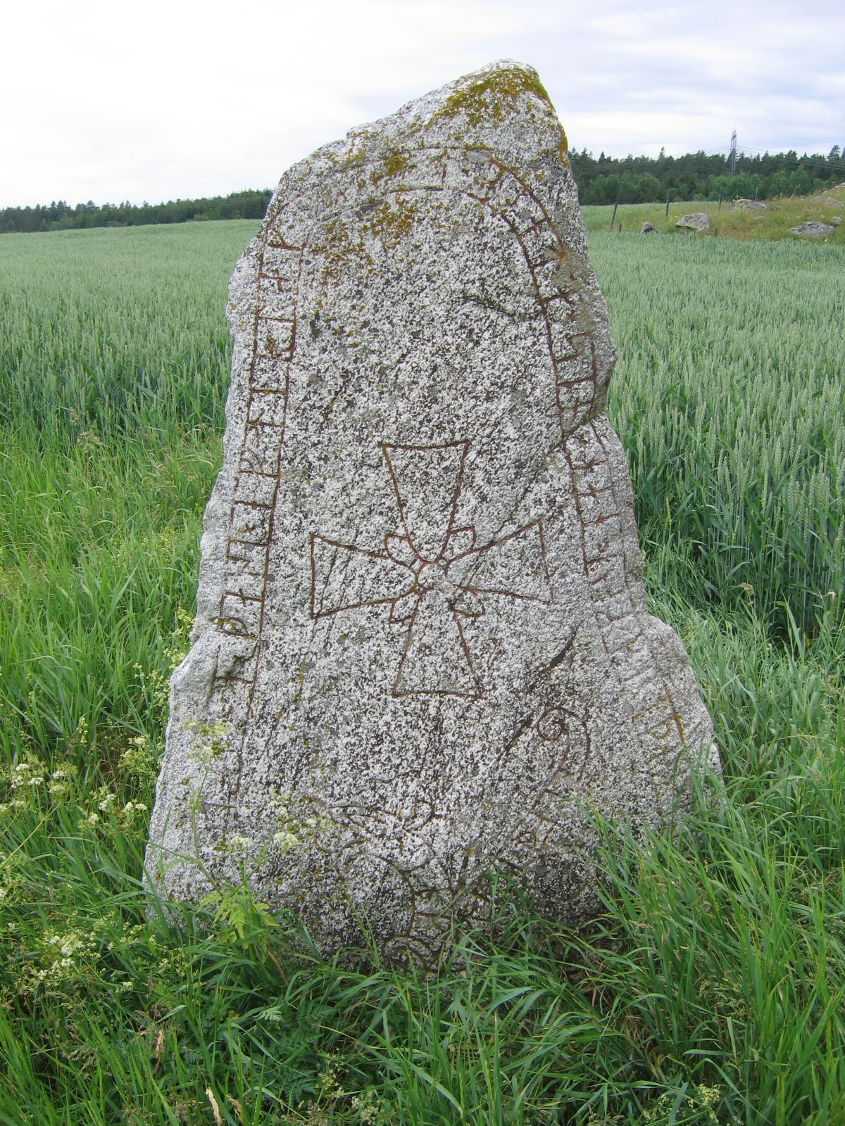 U 329, runestone at Snåttsta, Uppland, Sweden.